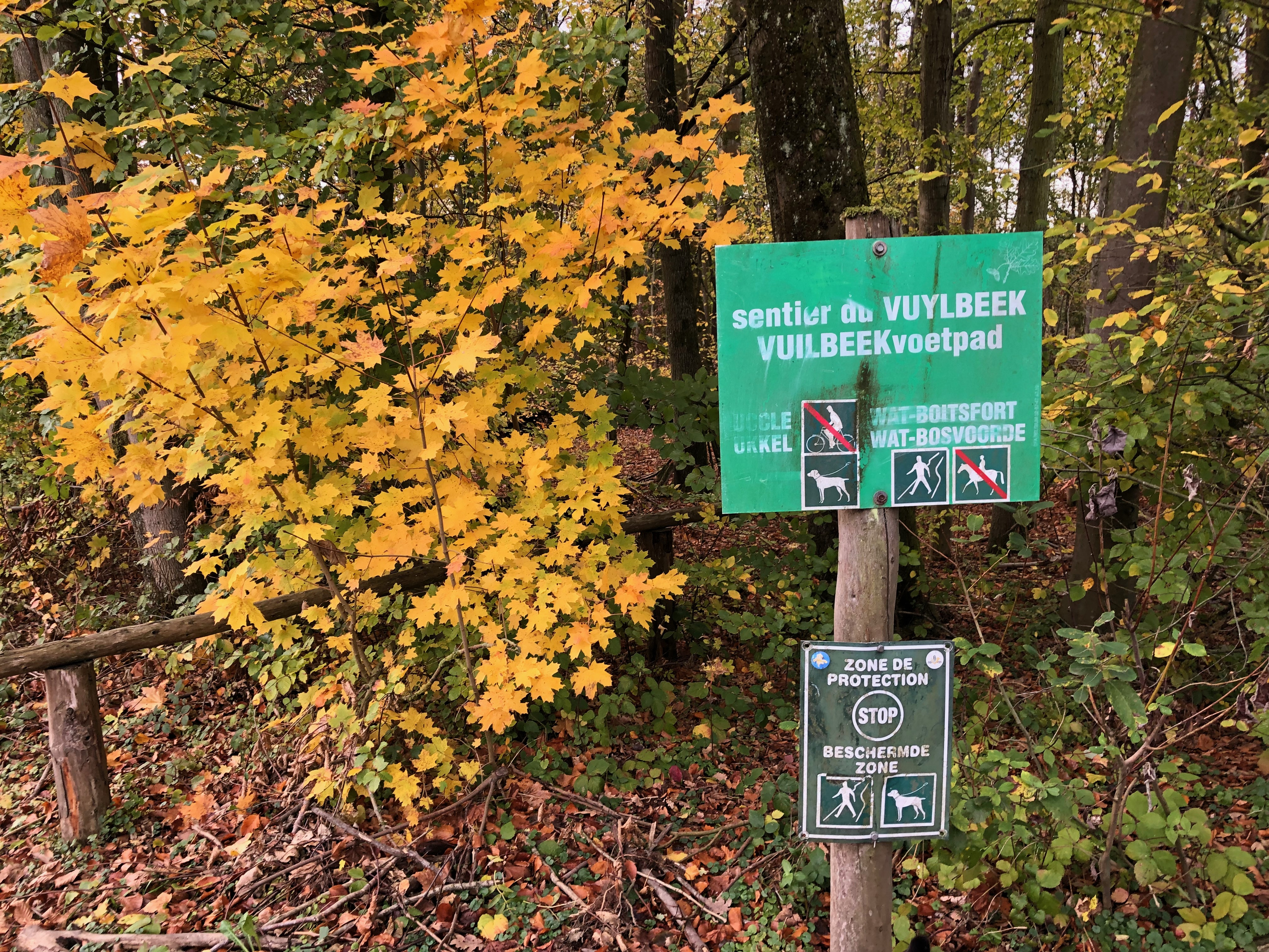 Vallon du Vuylbeek